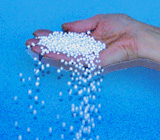 Krøyerkugler - Scanchemi Plastindustri ApS - 14-01-2005 - Torben A.L. Henssel